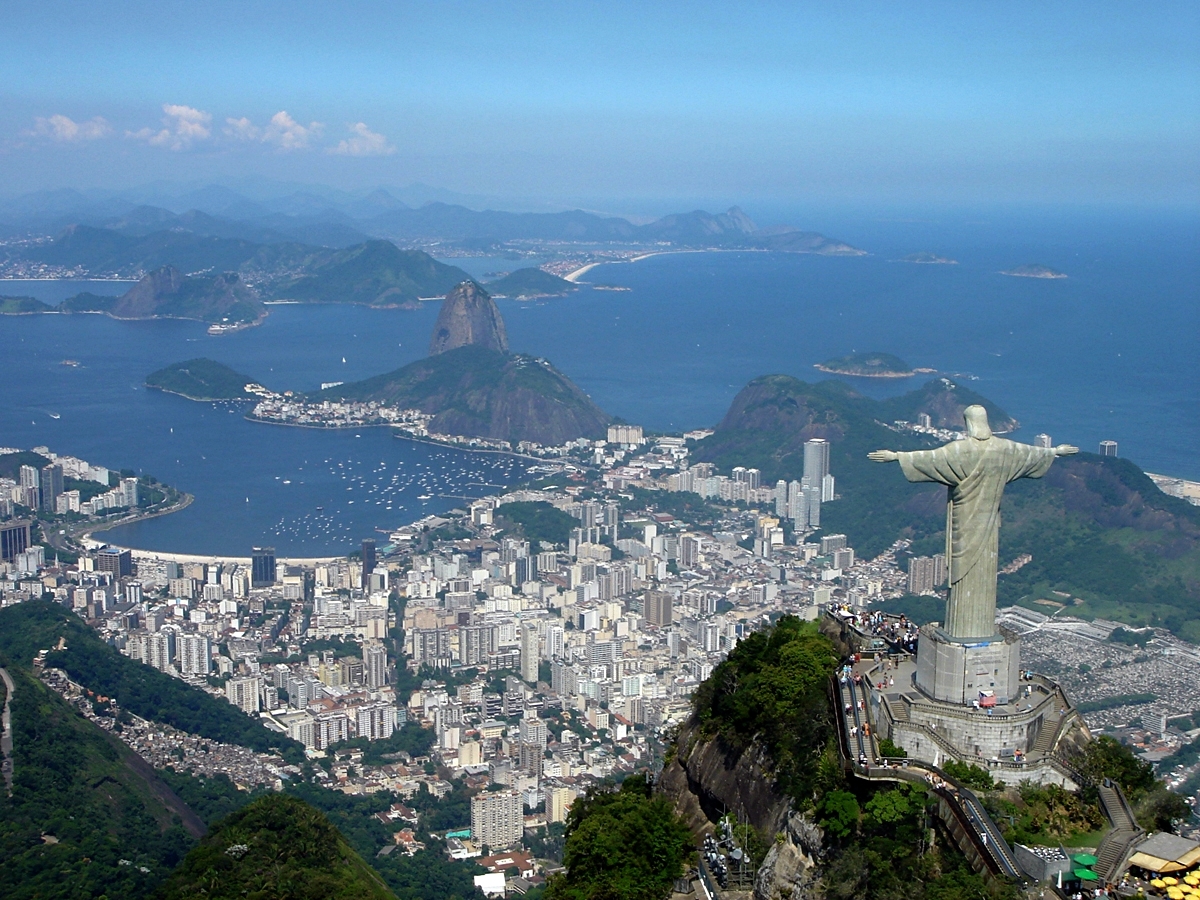 Vista panorâmica Cristo Redentor, Bahia de Guanabara, Pão de Açúcar e Botafogo, Rio de Janeiro, Brasil.